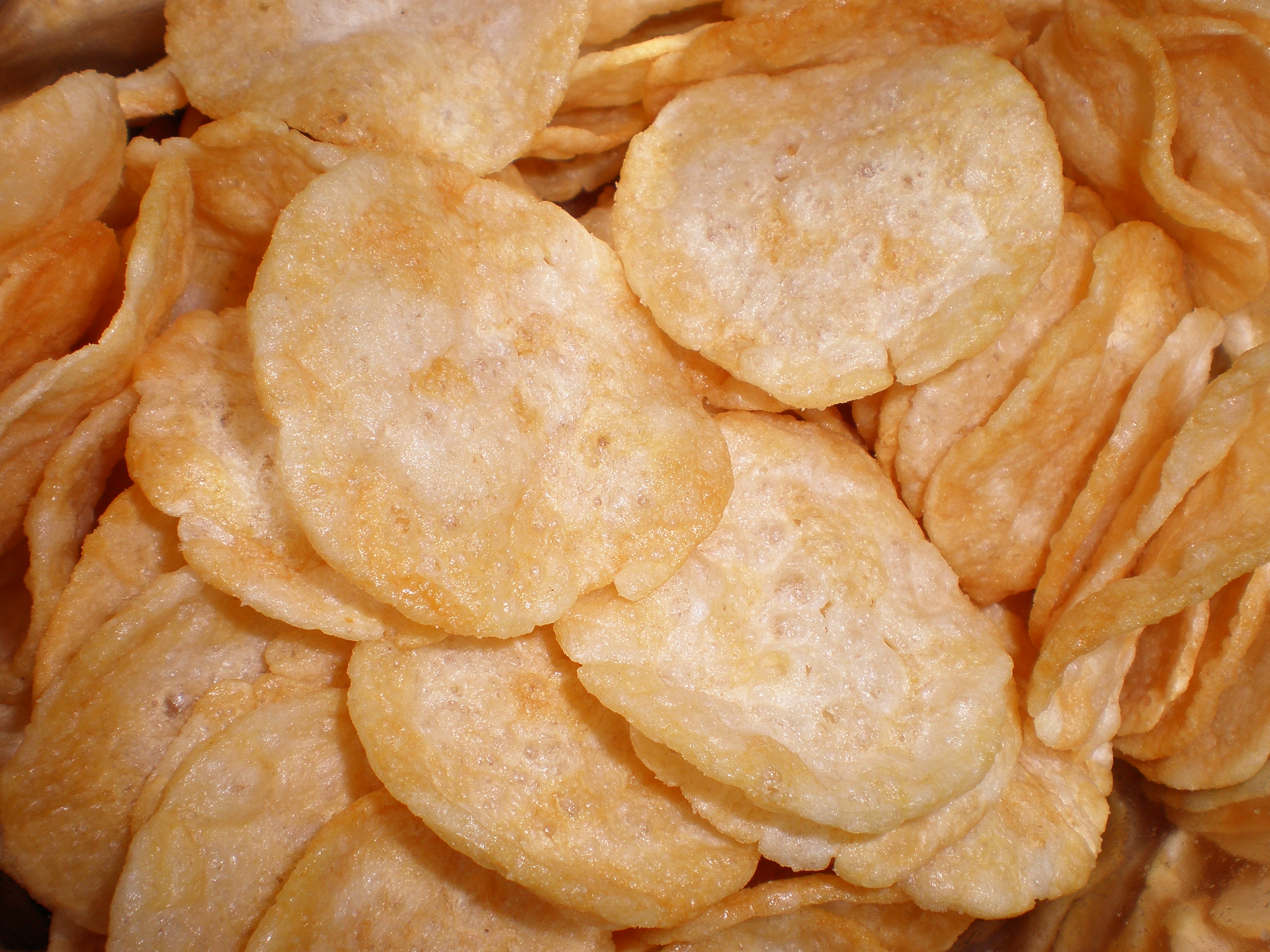 Original flavor Popchips